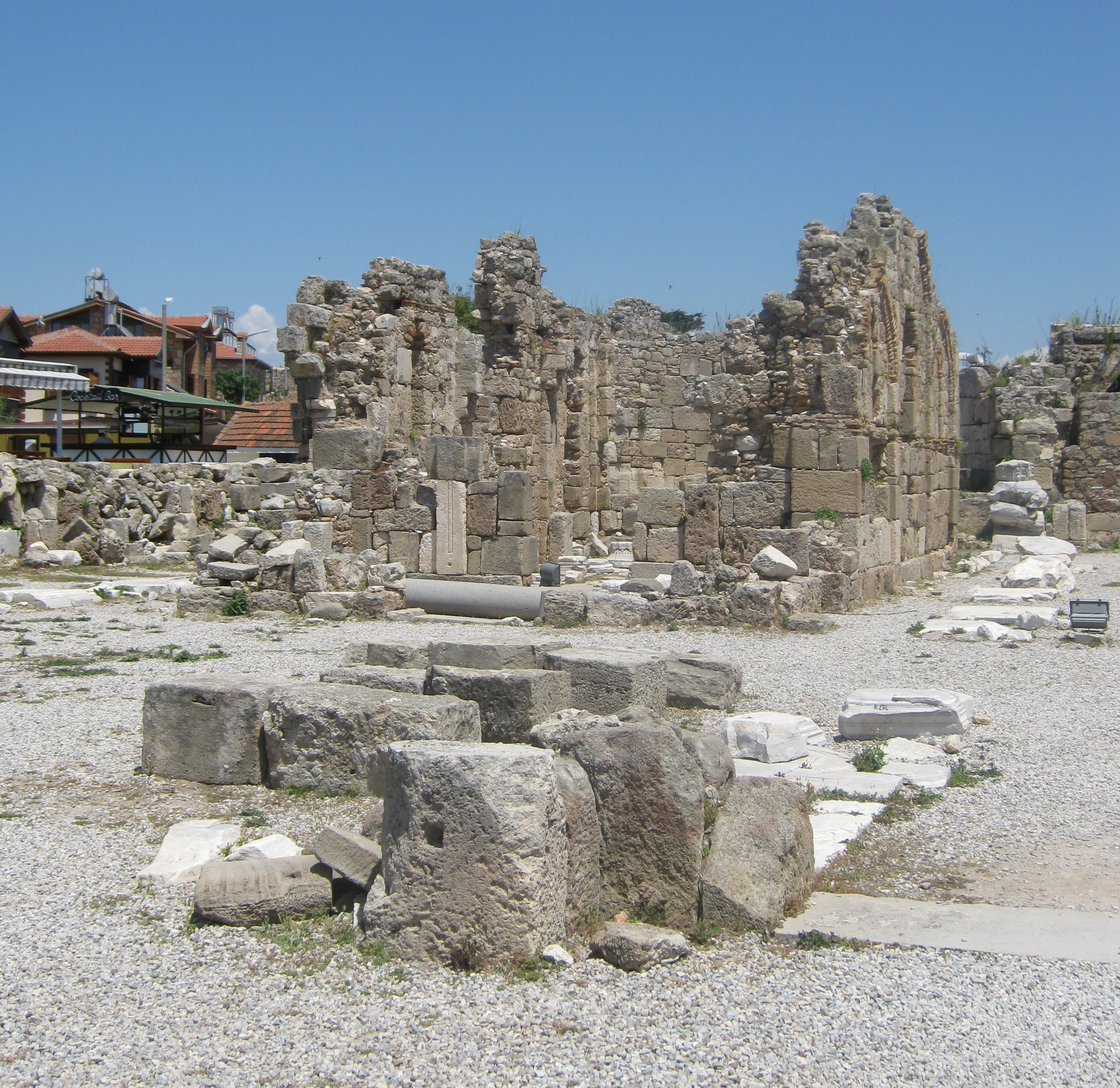 "Південна базиліка" загальний вигляд: загальний вигляд руїн південної базиліки